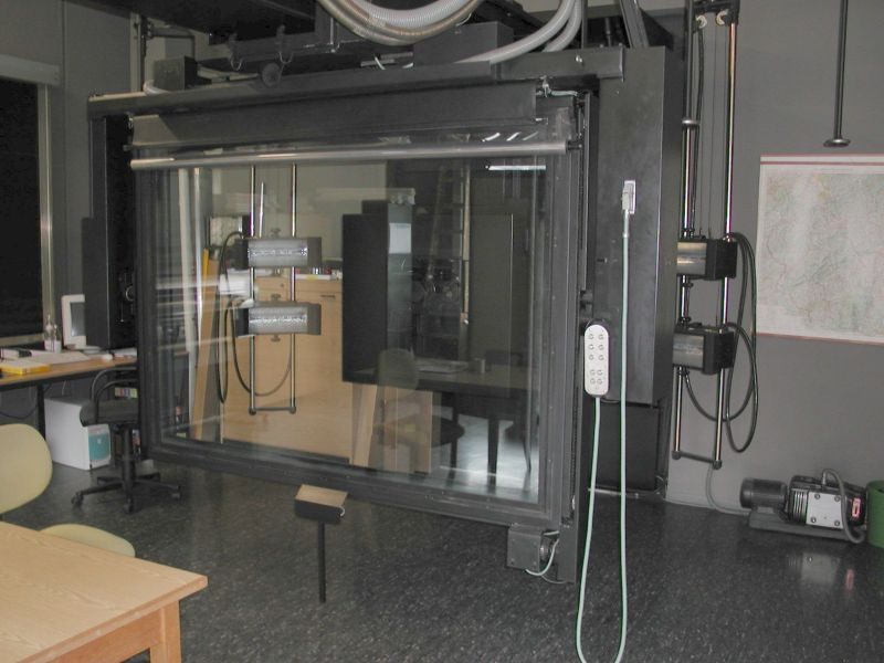 Zweiraumkamera (Hellraum) im Landesvermessungsamt von Rheinland Pfalz in Koblenz